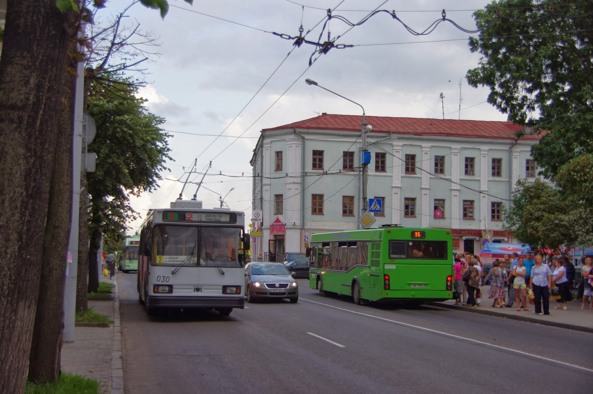 Lieninski District, Mogilev, Belarus